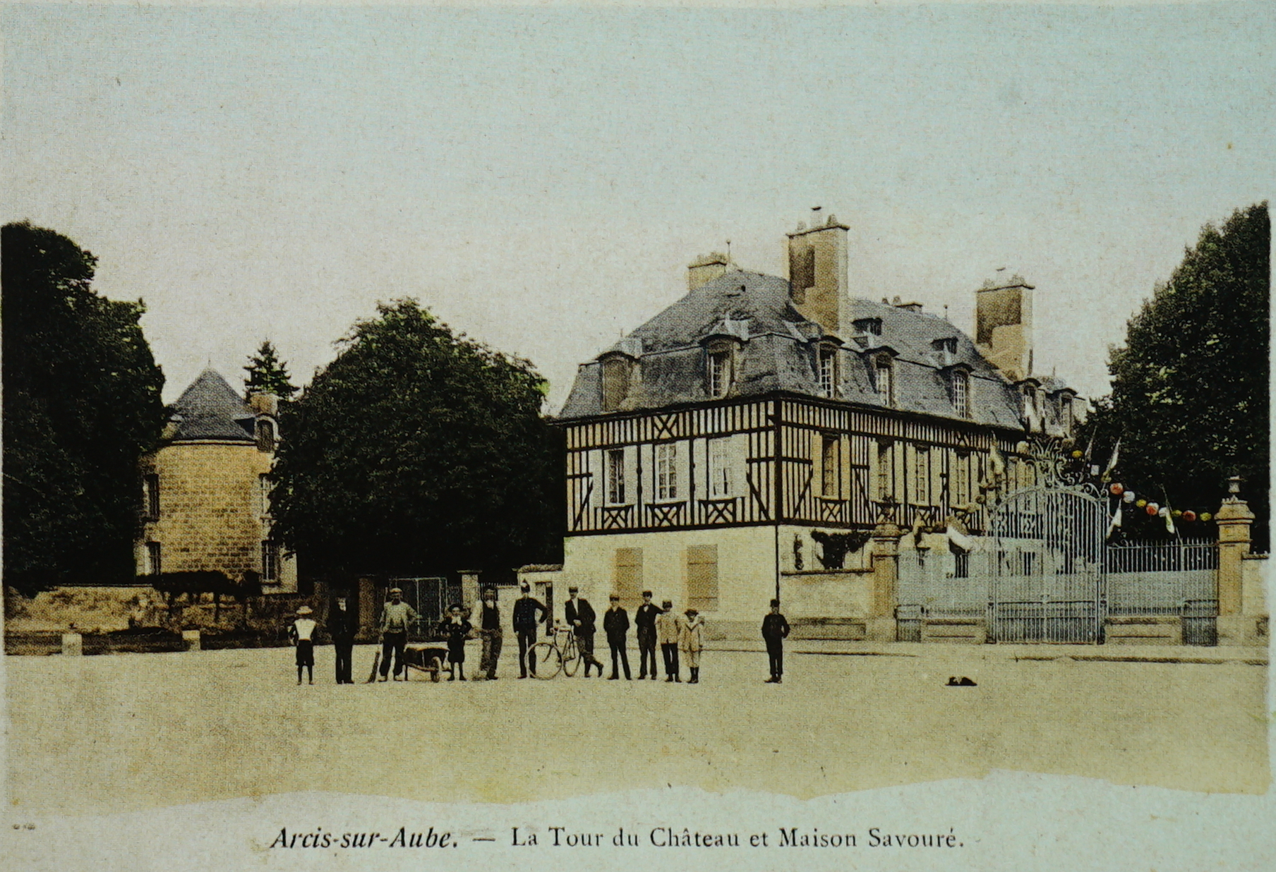 le chateau d'Arcis.